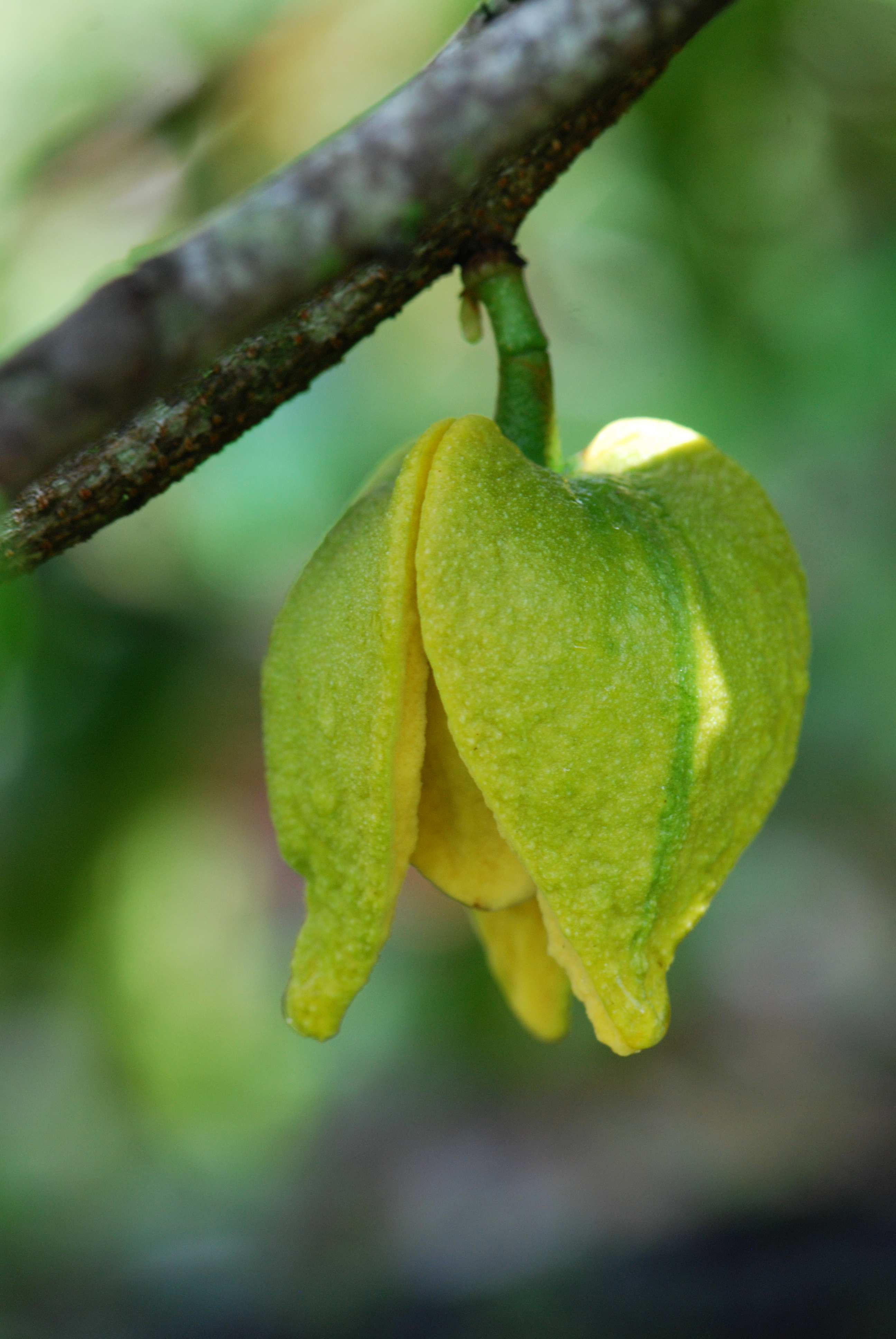 Annona muricata, fleur, Martinique